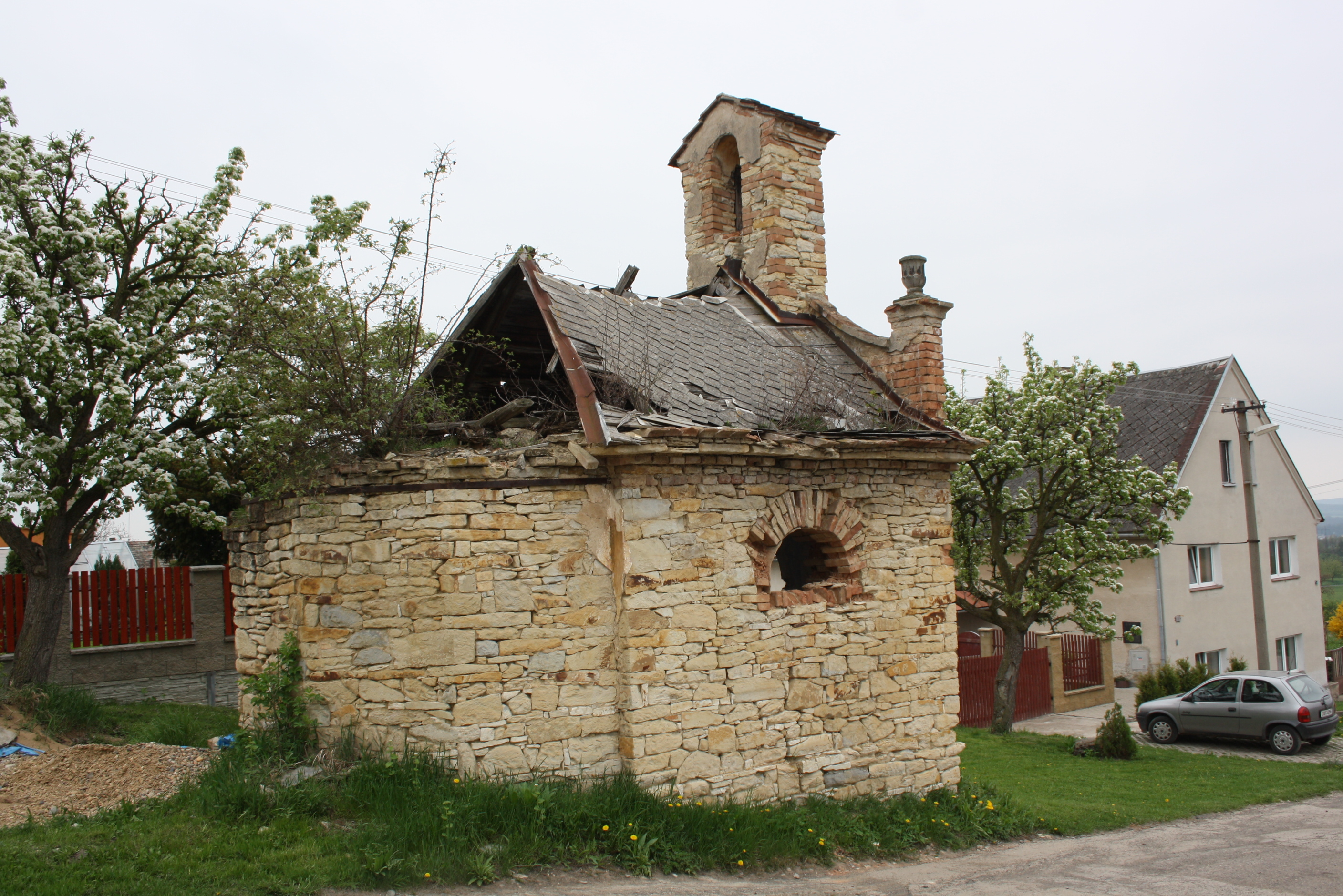 Kaplička v Trnové, části Libínek (pohled od severozápadu).